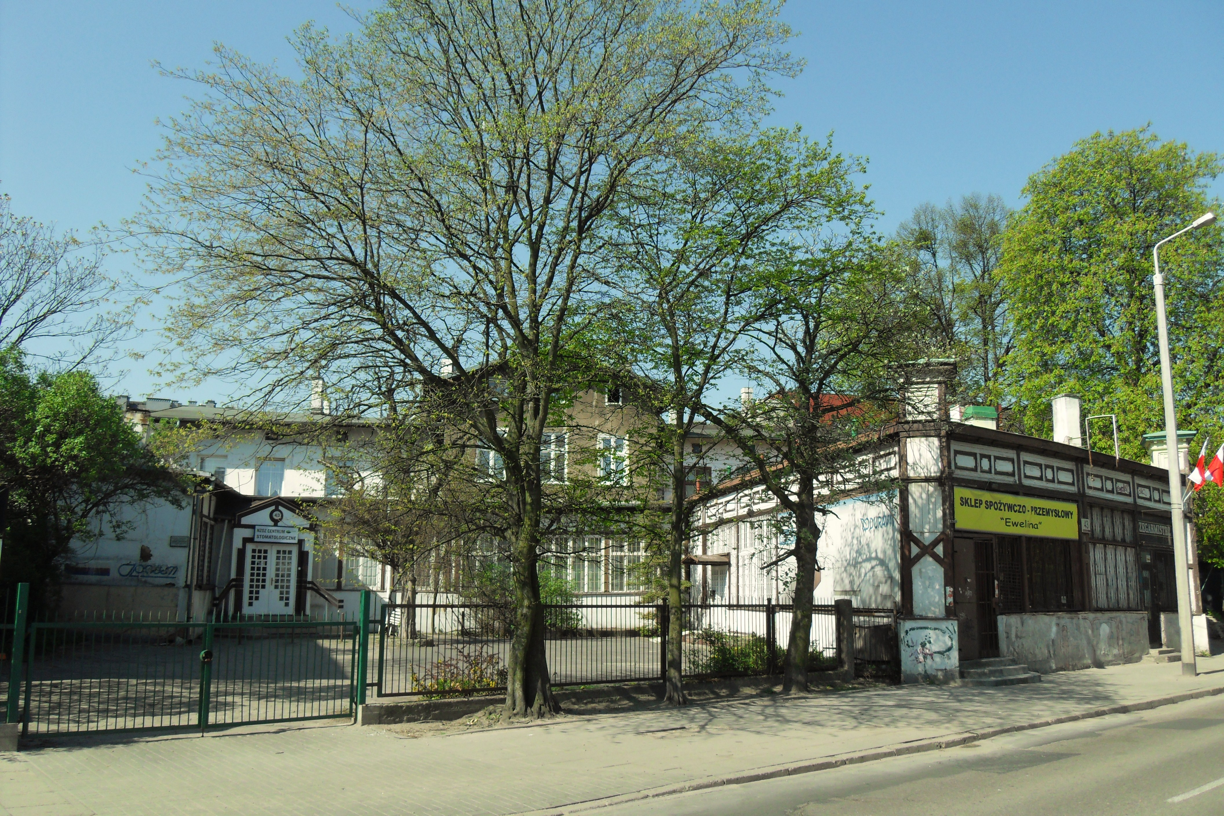 Gdańsk Aniołki. Al. Zwycięstwa 43, dawna kawiarnia "Połowa alei" ("Cafe Halbe Allee").